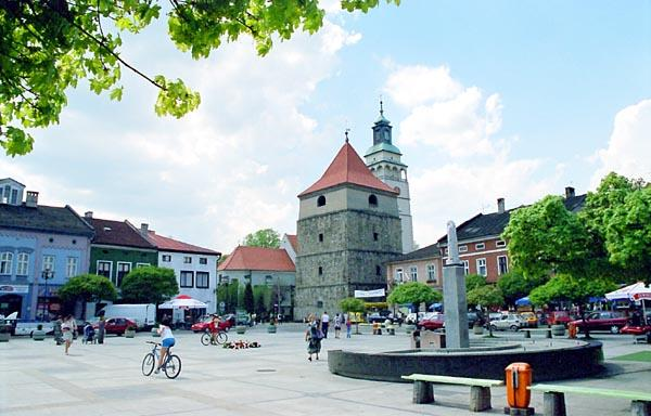 Zywiec in Poland